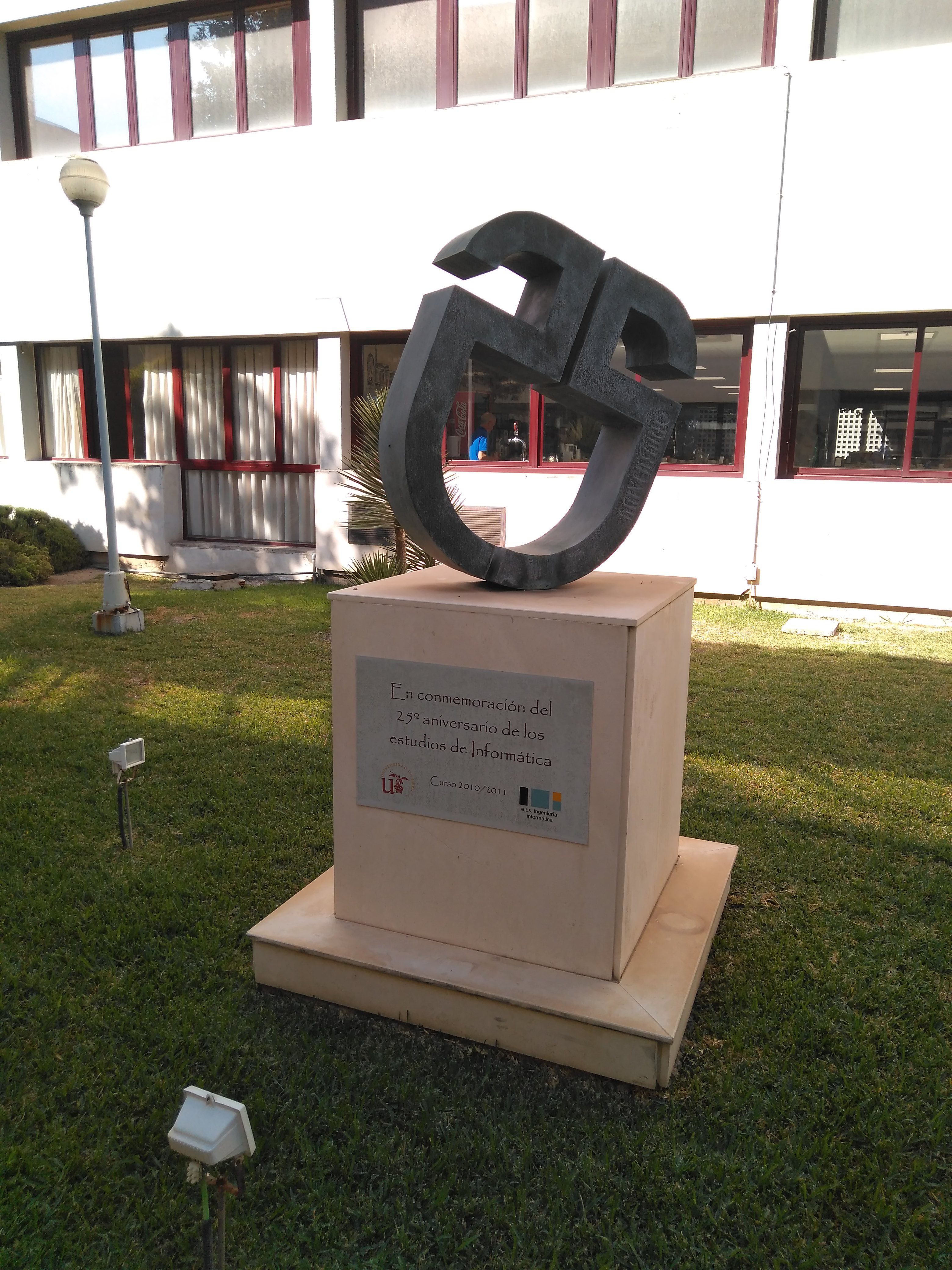 monumento 25 años de estudios de ingeniería informática universidad Sevilla